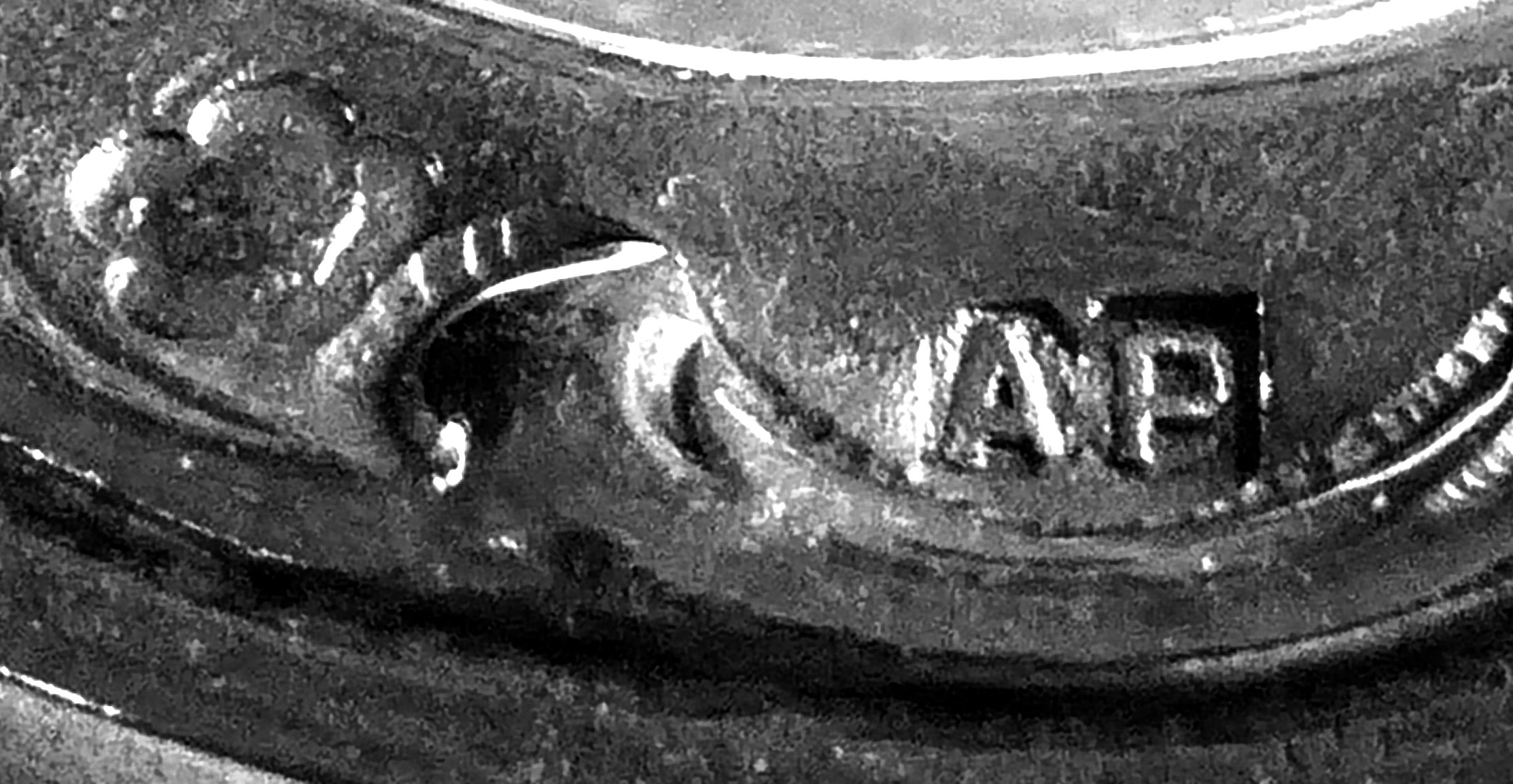 Alfred Pollak Meisterzeichen AP neben Dianakopfpunze; vor1922